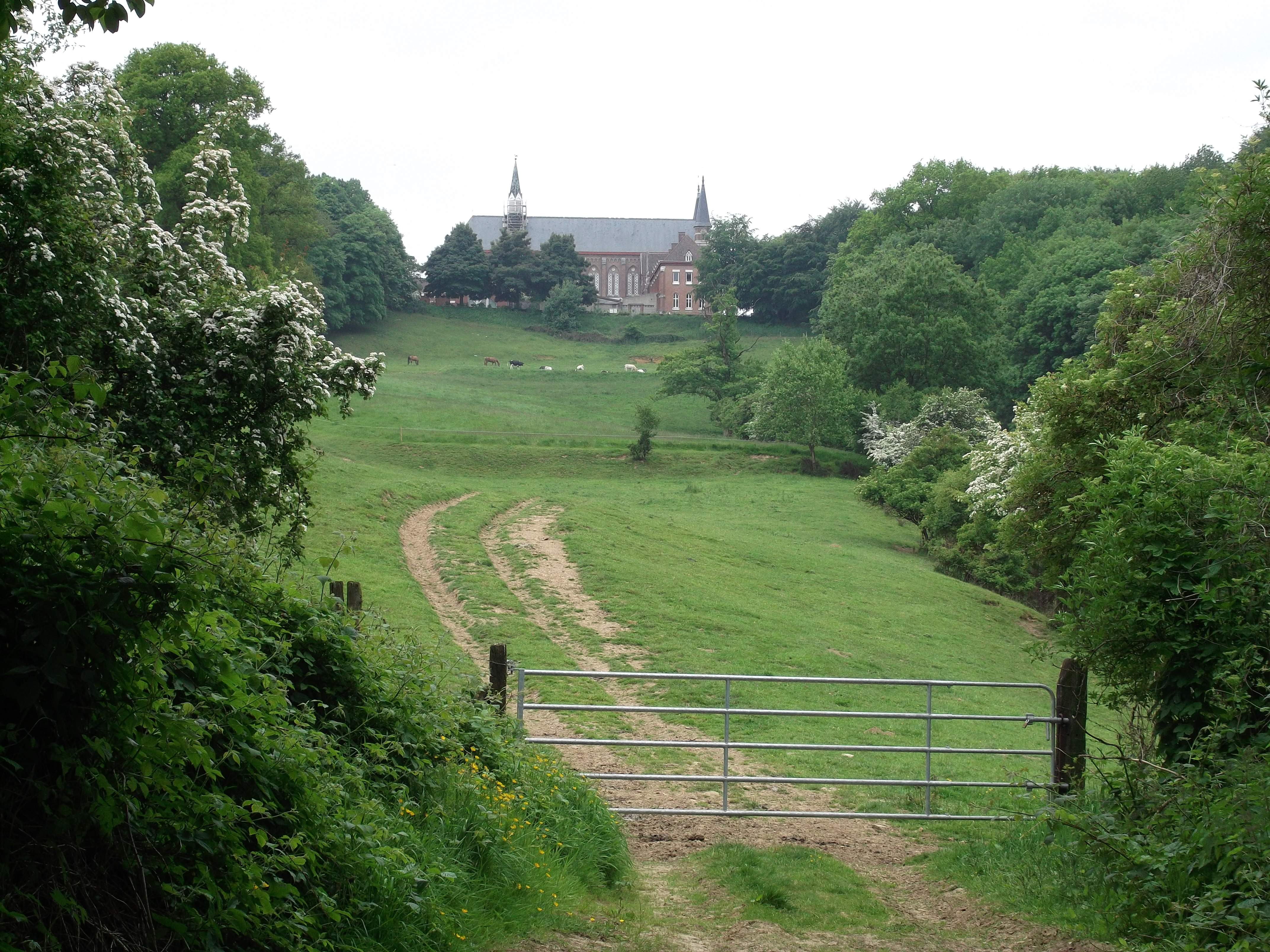 zicht op de abdij op de Katsberg vanuit de lagerliggende graslanden